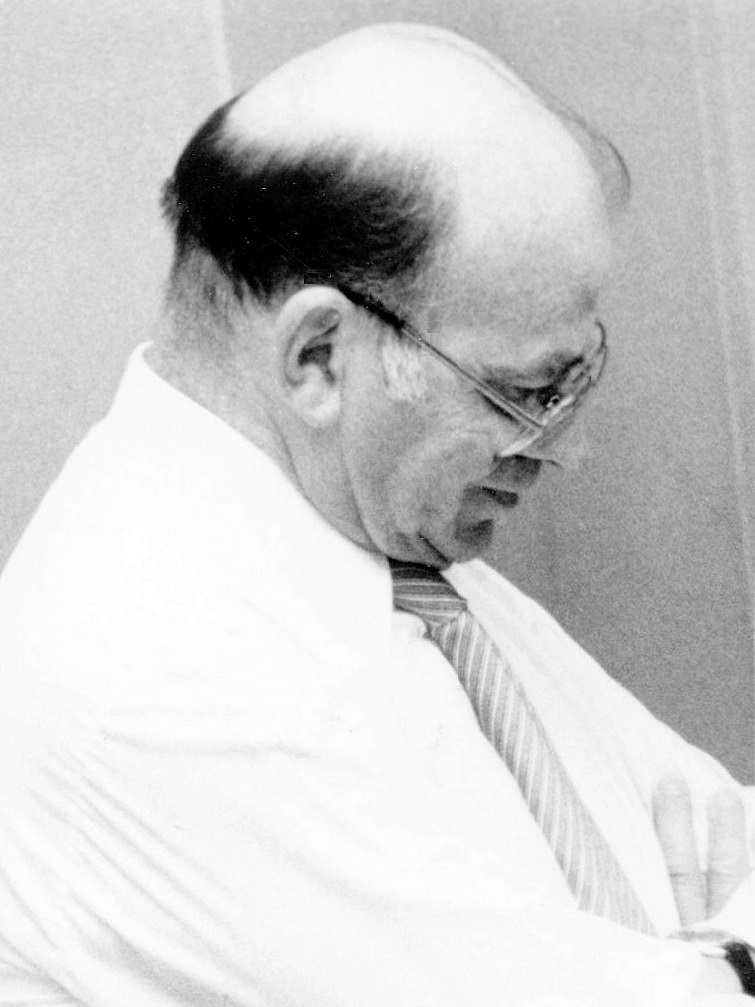 Berthold Schlieper (Vorstandfunktionen im Spielbetrieb der Deutschen Schachjugend), Deutsche Jugendeinzelmeisterschaften 1984 in Miesenbach.